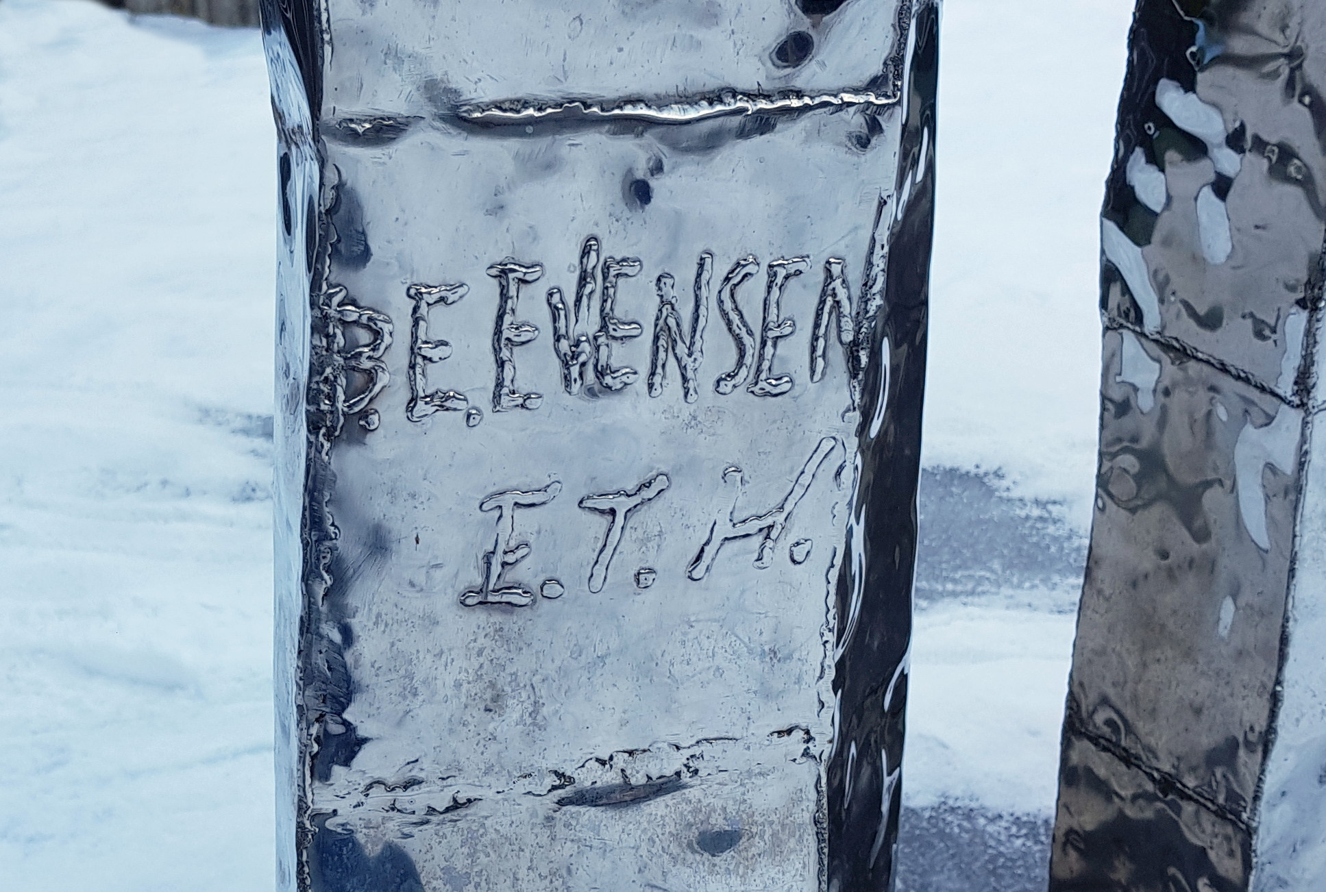 Skulptur "Orgelfjärilen", Synskadades riksförbund, Sandsborgsvägen 52, Enskede, detalj. På skulpturen står "B. E. Evensen, E. T. H.". Bör vara Björn Erling Evensen.